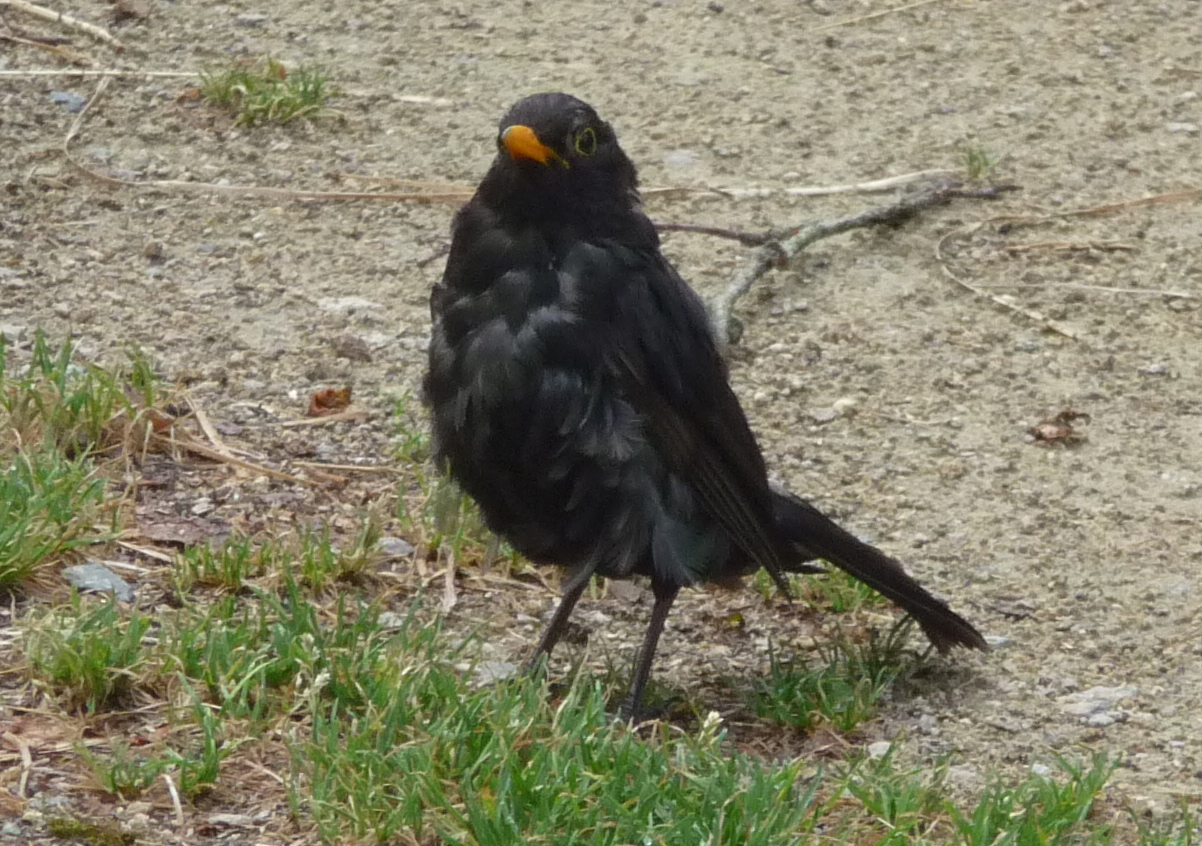 Turdus merula, mâle en mue, Penn ar Run Izella (Goulien, Finistère, Bretagne, France)